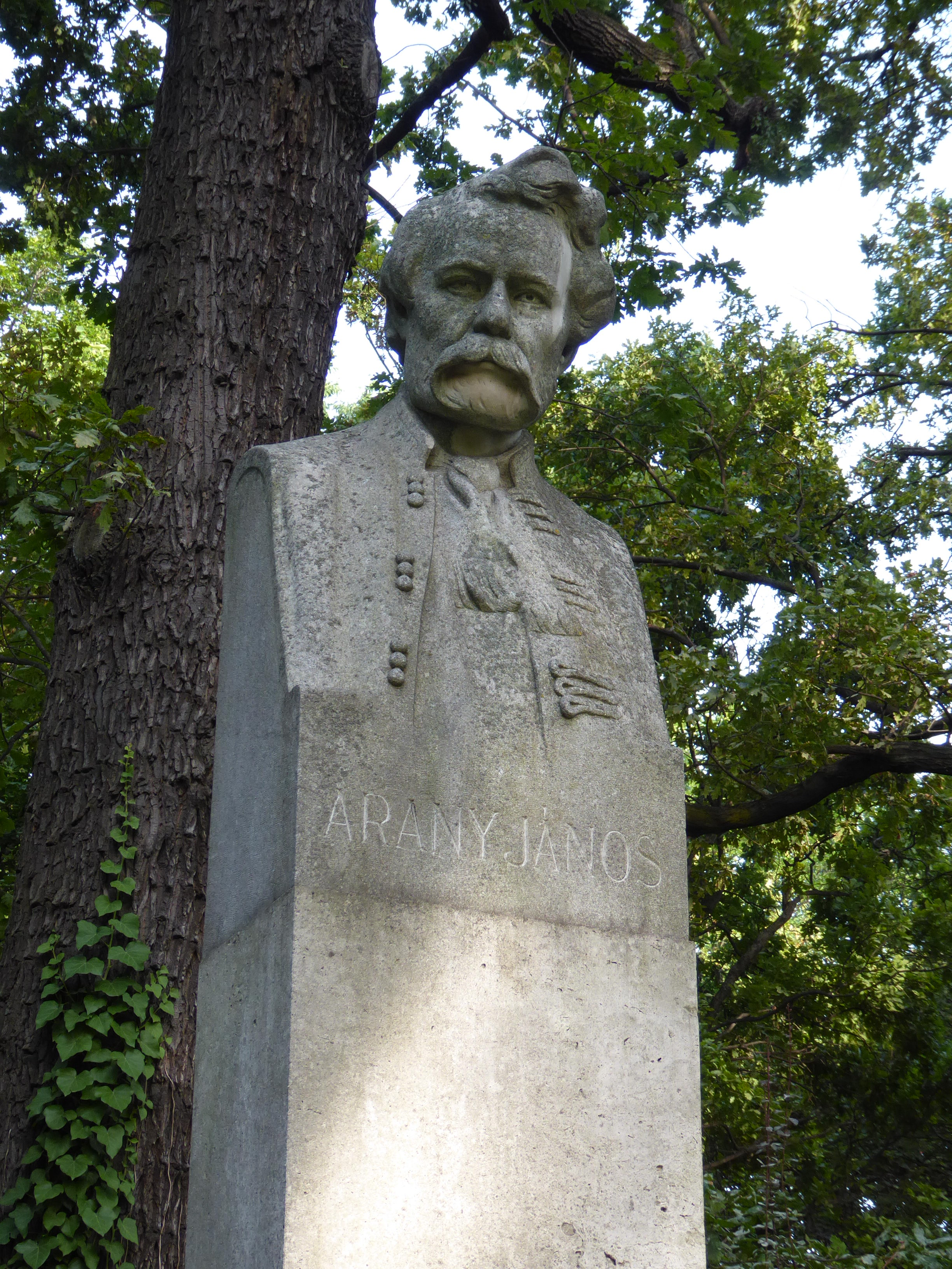 Arany János mellszobra a Margit-szigeti szoborparkban, magas talpazaton. A fényképet 2017-07-22-n készítettem.